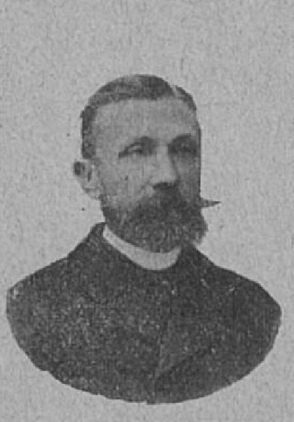 František Beneš (1847 - ?), rakouský politik z Čech, působící na Moravě; poslanec Moravského zemského sněmu